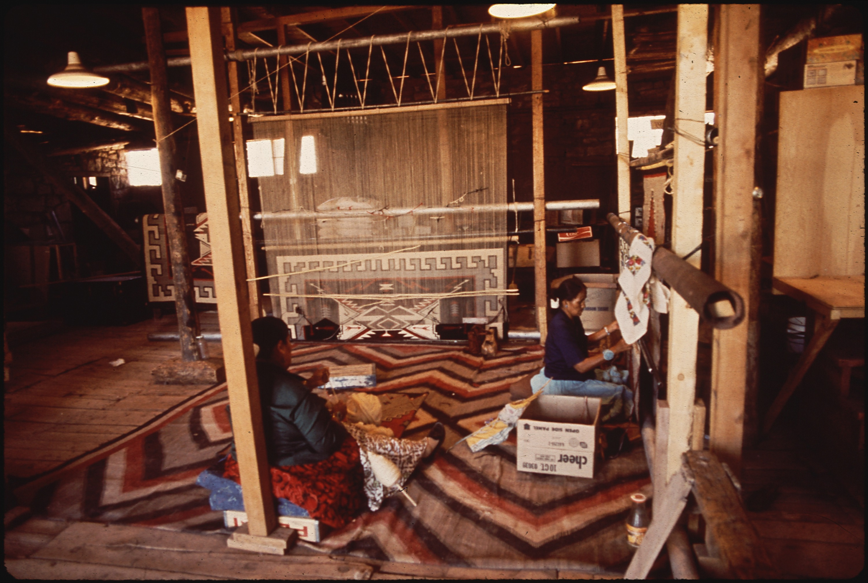 Scope and content